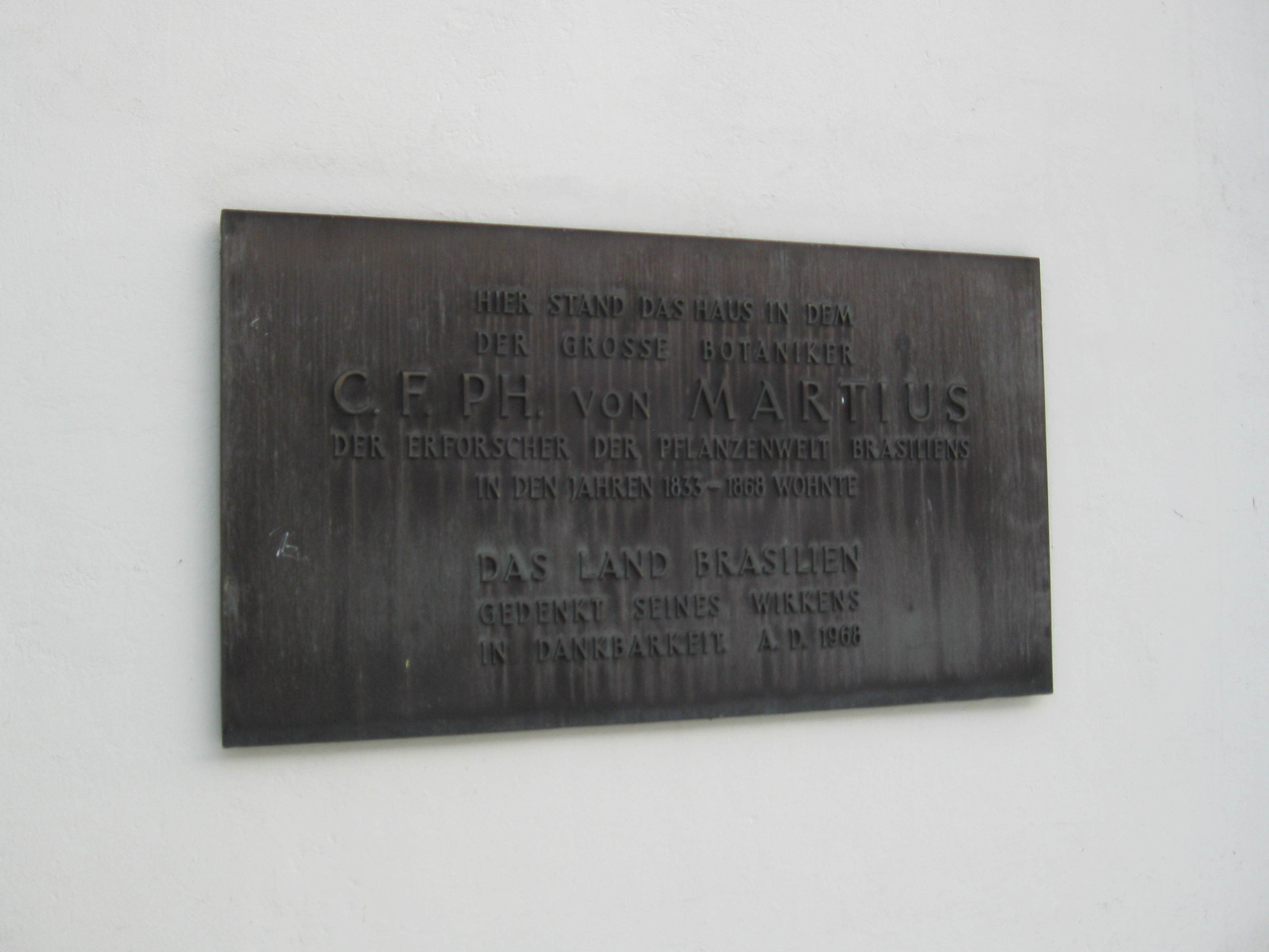 Gedenktafel für den Botaniker Carl Martius, aufgestellt 1968 vom Staat Brasilien